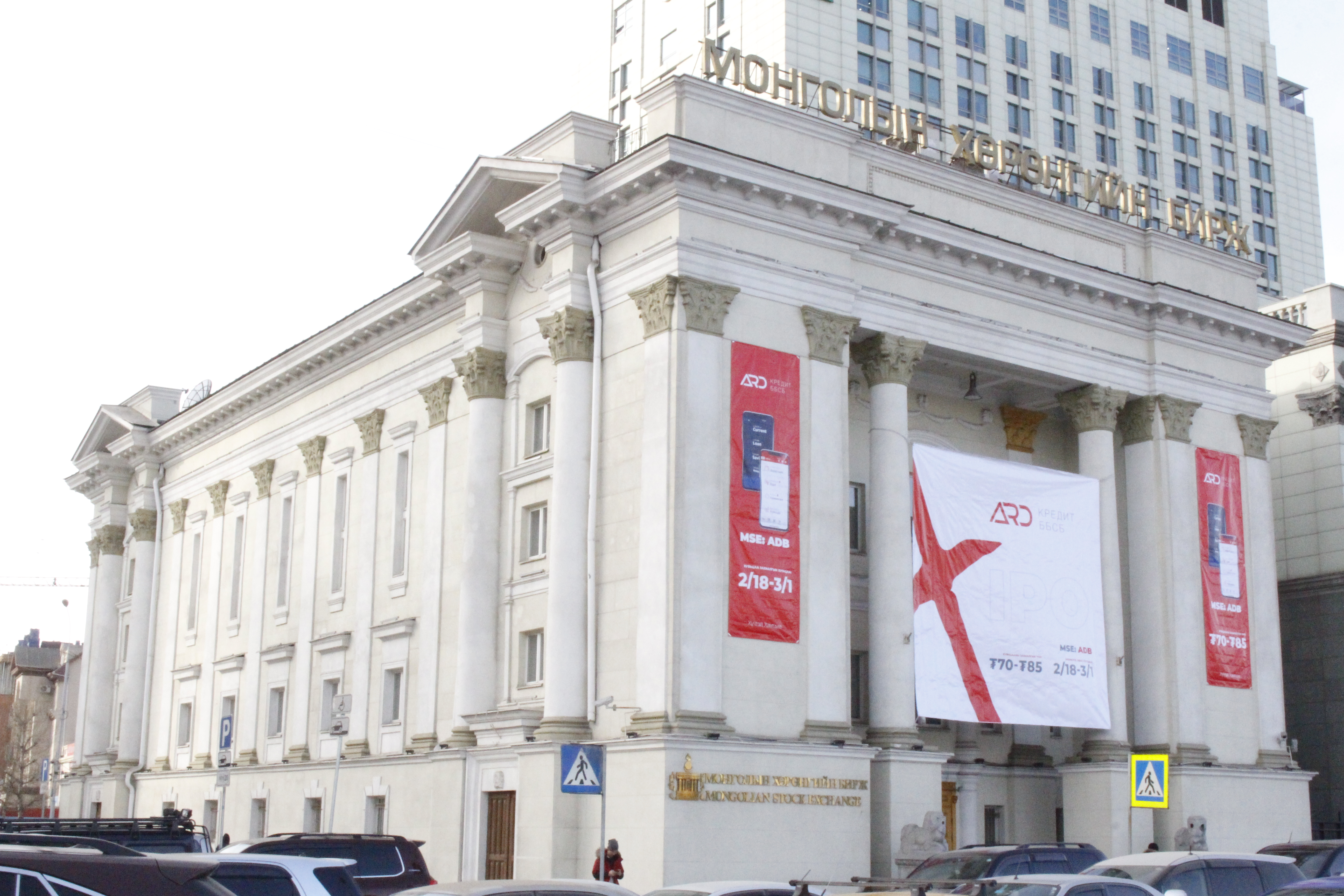 Монгол: Монголын хөрөнгийн бирж